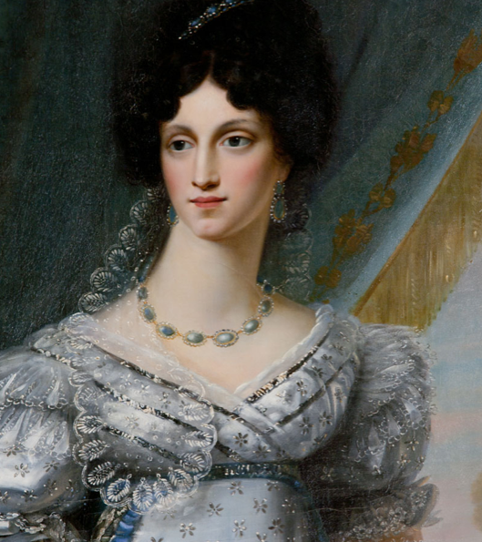 Portrait de la duchesse de Dino (1793-1862) (détail)